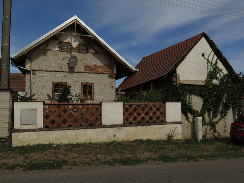 Usedlost čp. 18, Mezihoří 18, Mezihoří (okres Klatovy).